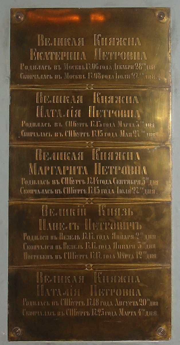 Бронзовая доска с гравированной надписью на стене Петропавловского собора